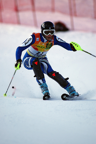 Annalisa Ceresa in Aspen